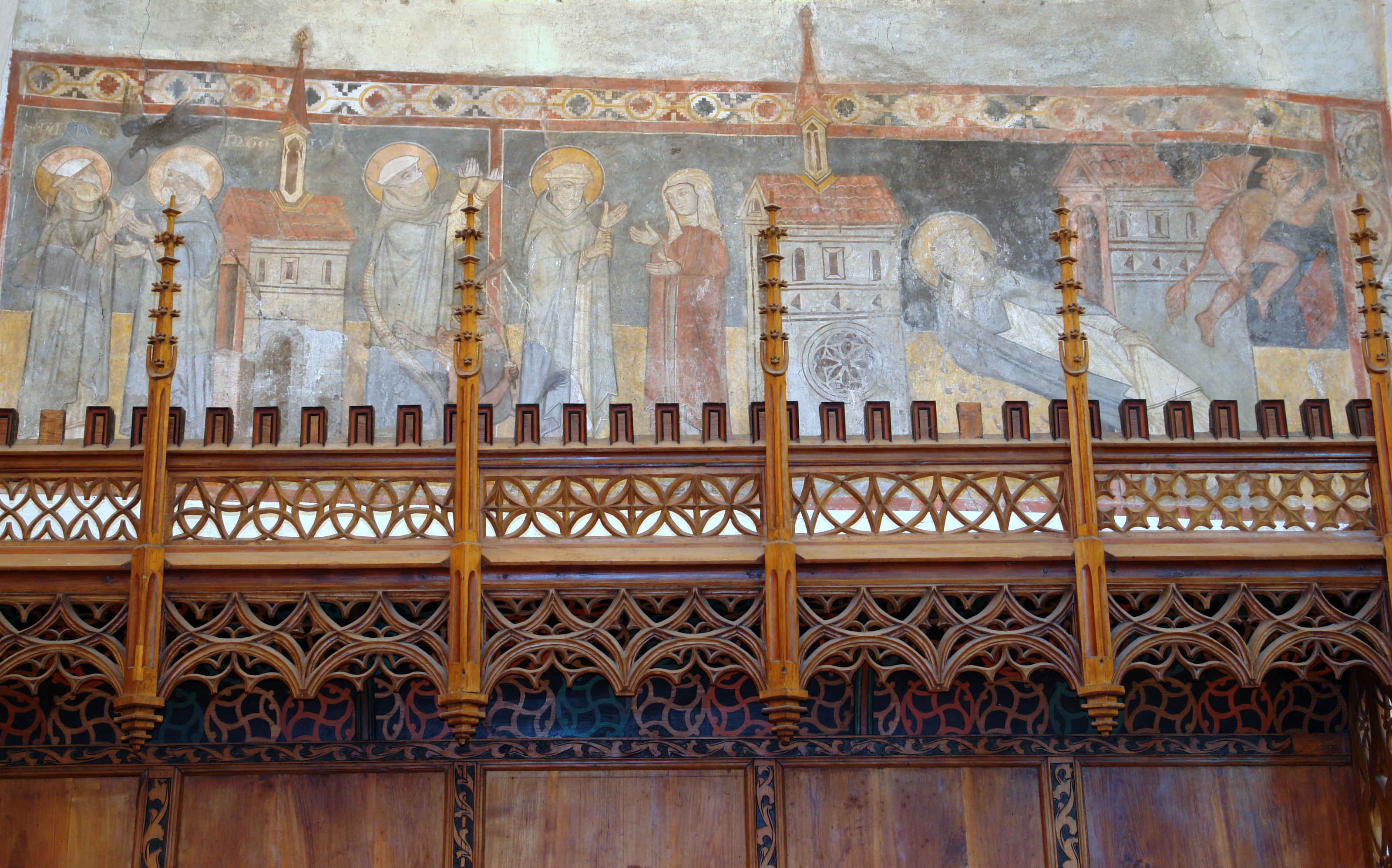 Szent Erzsébet, egykori antonita kolostor-templom Szepesdarócon. Középkori freskók a stallumok felett